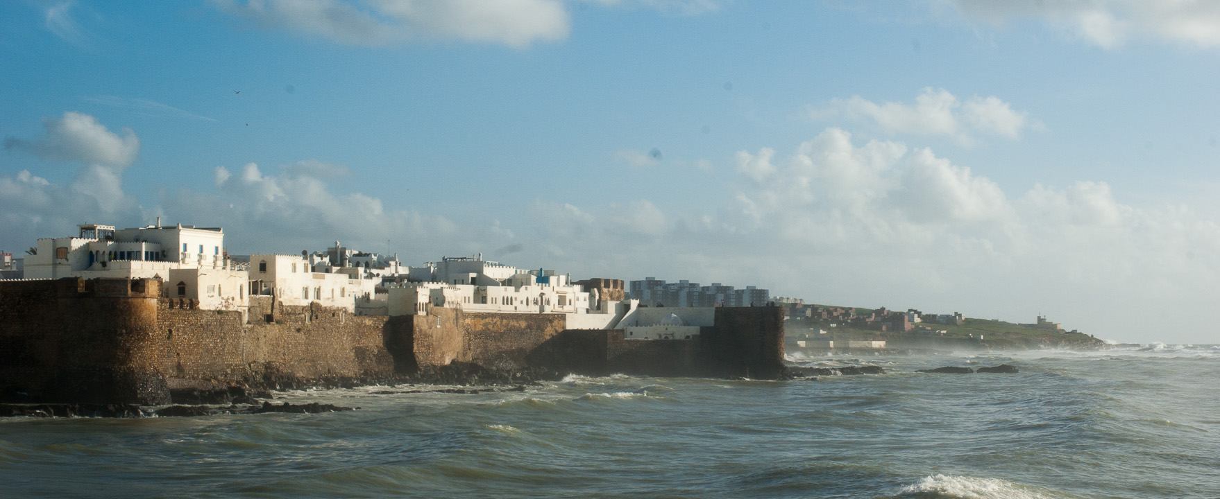 Remparts d'Assilah depuis la jetée du port